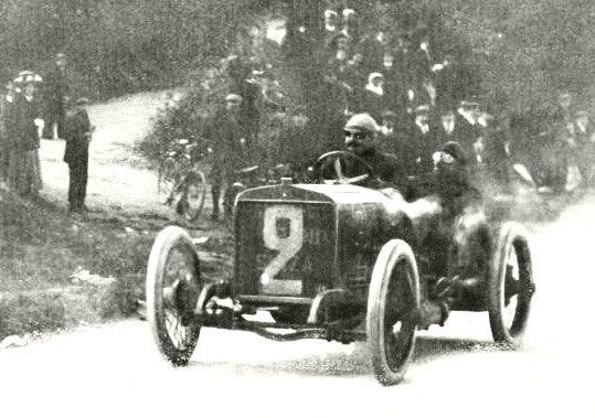 Paul Zuccarelli vainqueur de la Coupe des Voiturettes 1910 à Boulogne, sur Hispano-Suiza type Alphonse XIII (La Vie au Grand Air du 29 juin 1912, p.520)